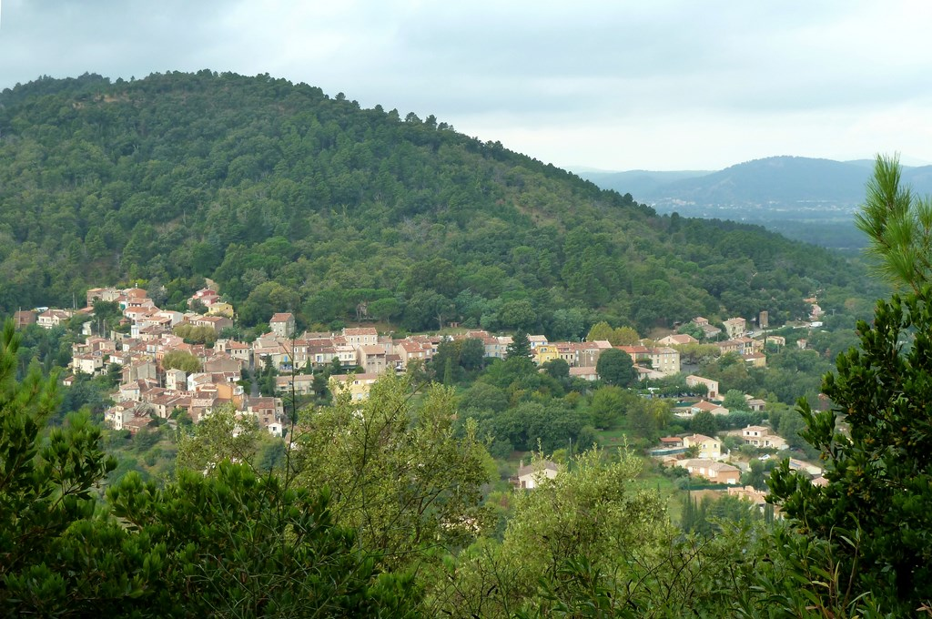 Village des Mayons - Var - France